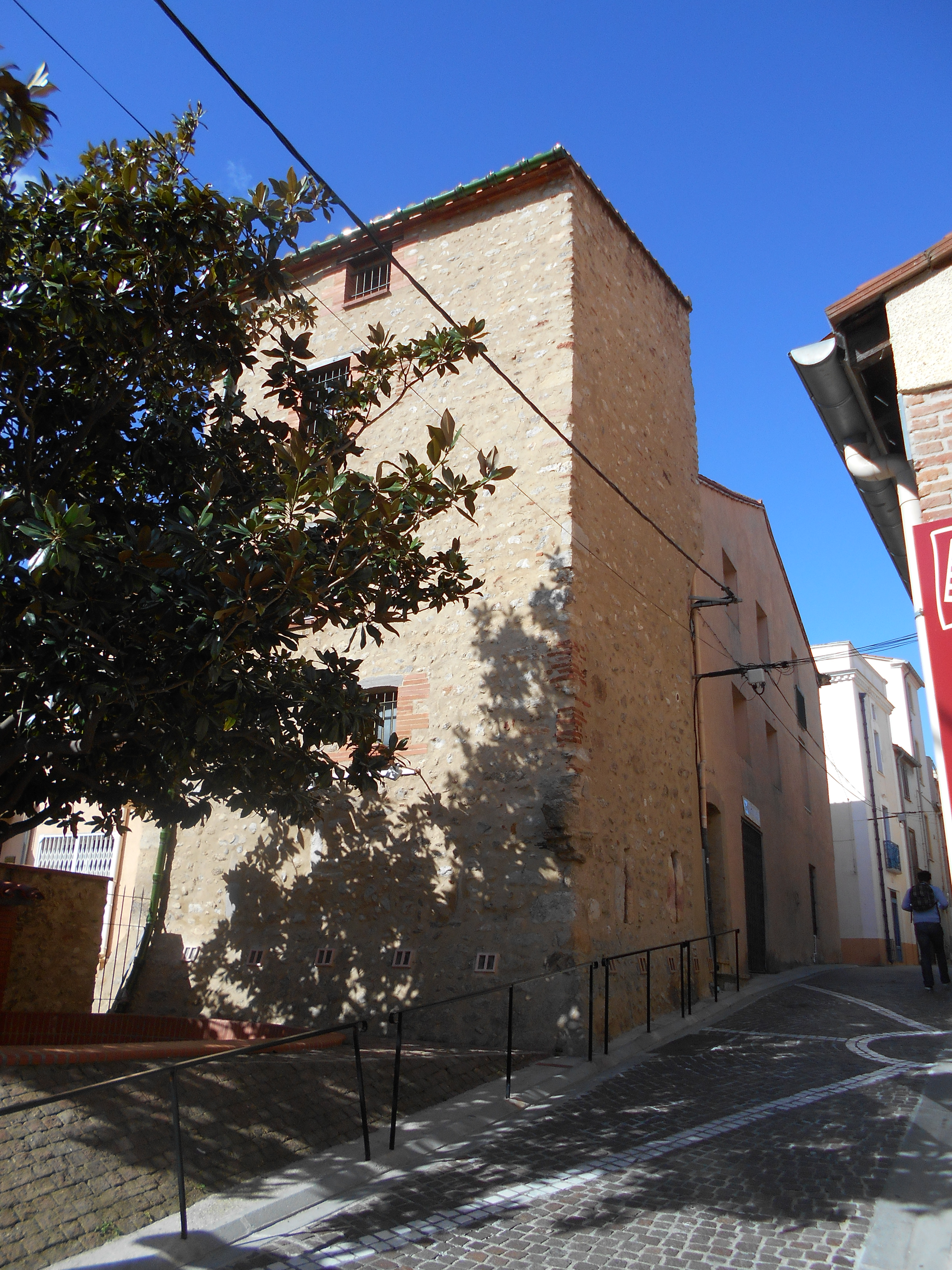 Muralles de la vila d'Argelers de la Marenda.